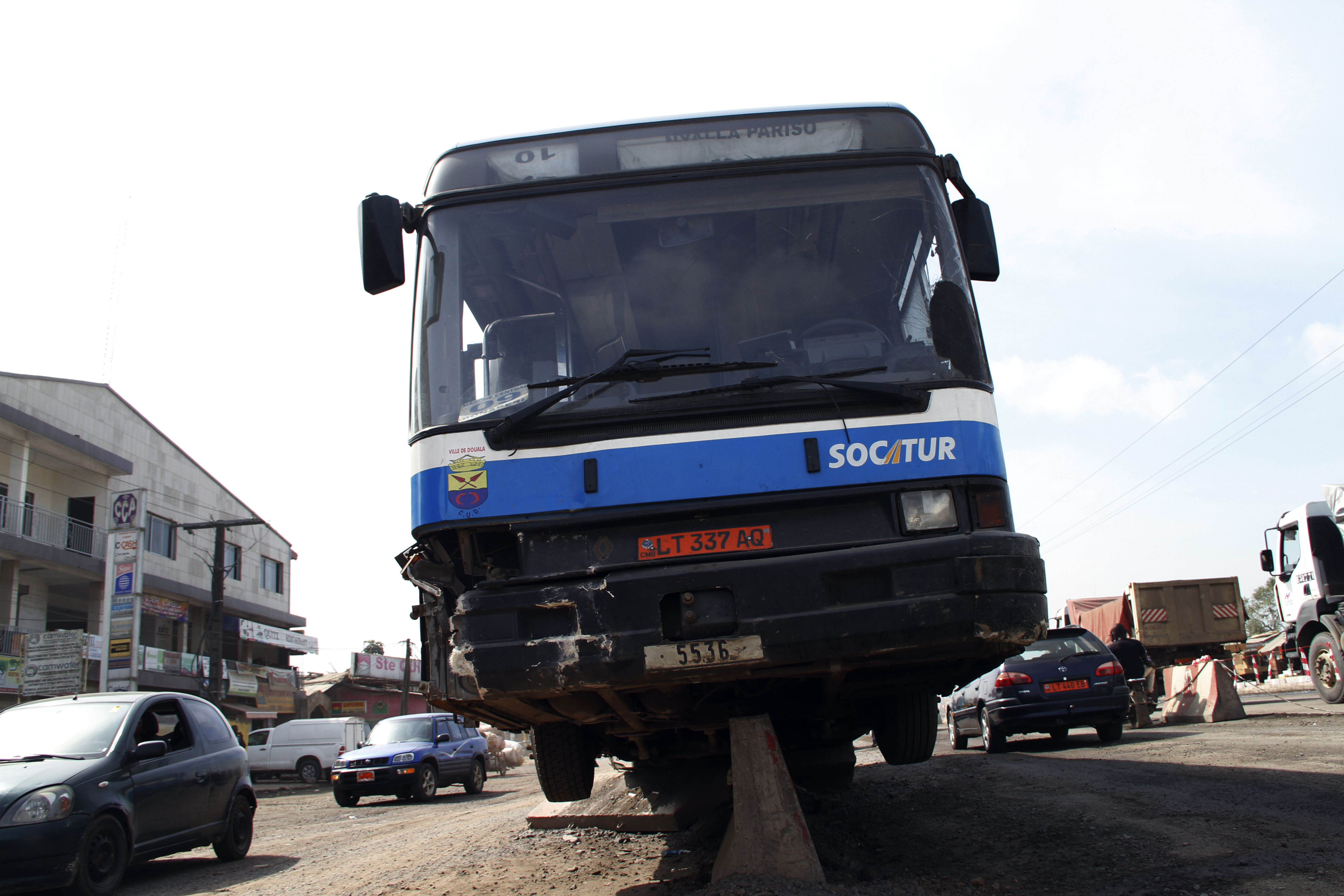 Un bus de la société de transport urbain de la ville de Douala rate le chemin et se retrouve sur un bloc dans un chantier à Bonabéri au Cameroun This is an image with the theme "Africa on the Move or Transport" from: Cameroon